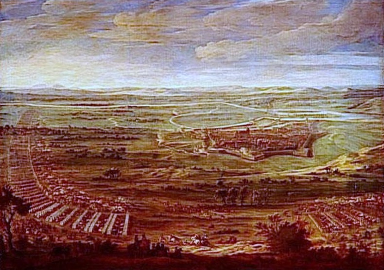 Photographie d'un tableau de Jean-Baptiste Martin (1659-1735), peint à la fin du XVIIe siècle, représentant le premier siège de Dole, par les troupes du roi de France Louis XIV, en 1674.